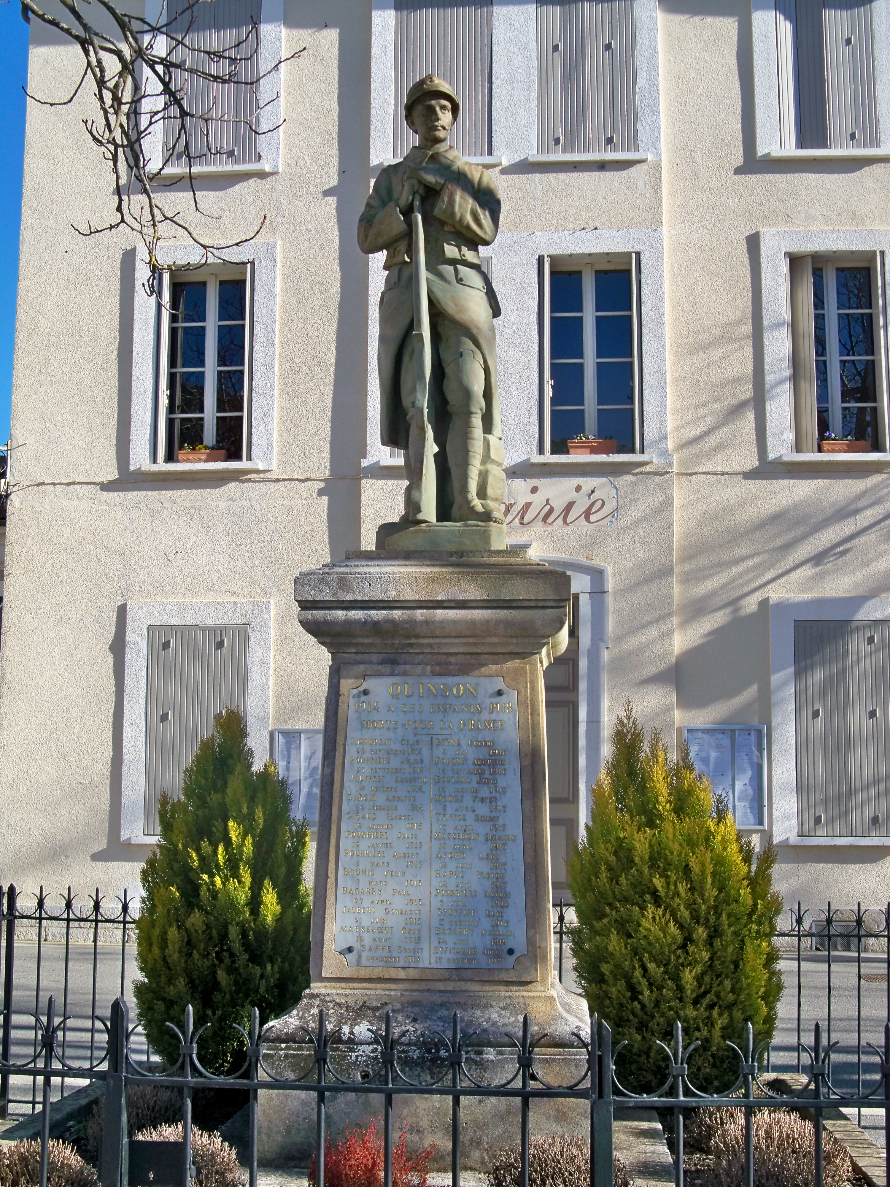 Monument aux morts de Quinson (04), France